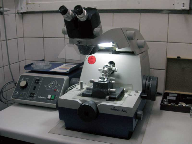 Reichert & Jung Ultracut E Mikrotom